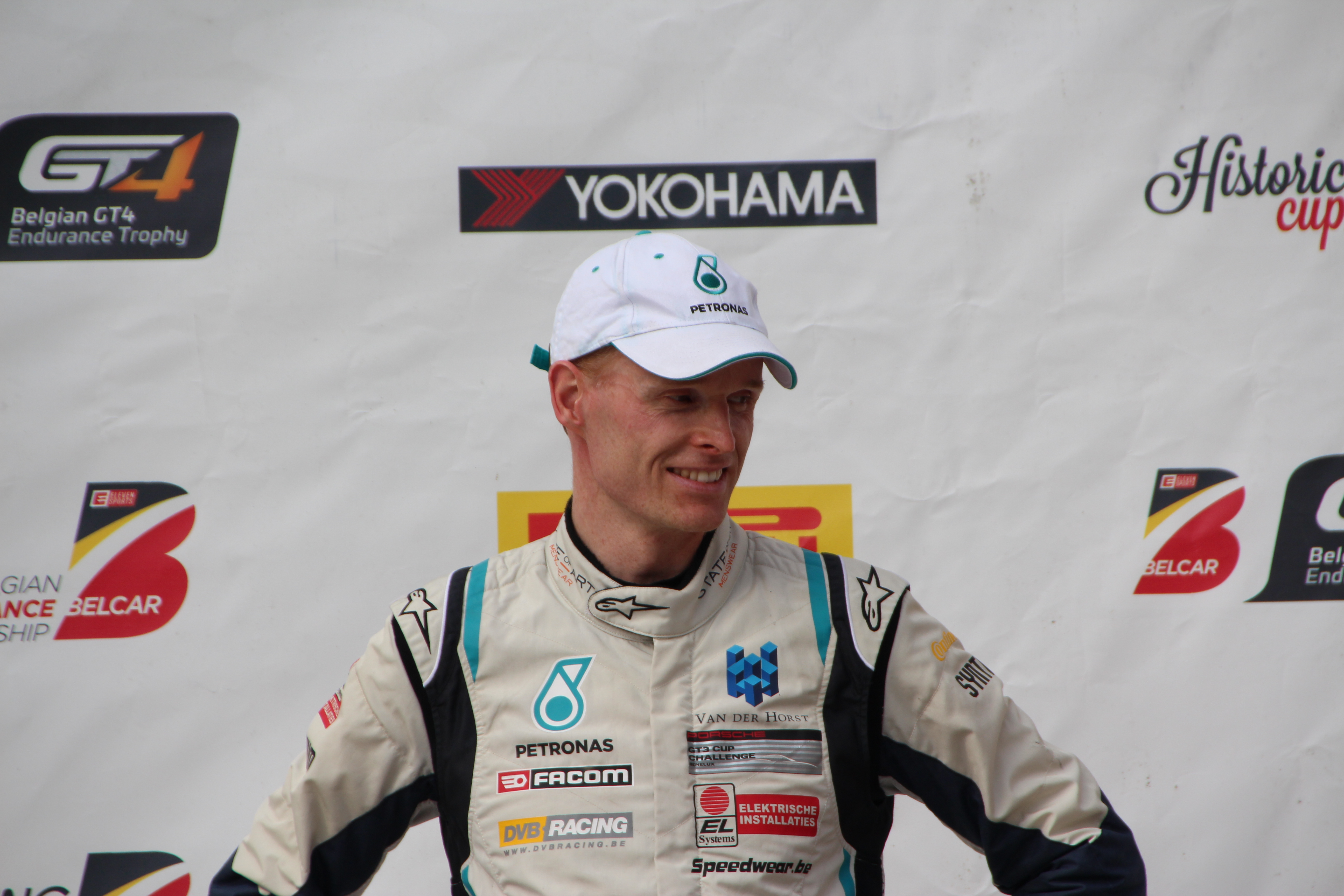 Jeffrey Van Hooydonk Belcar kampioen 2018 21 oktober 2018